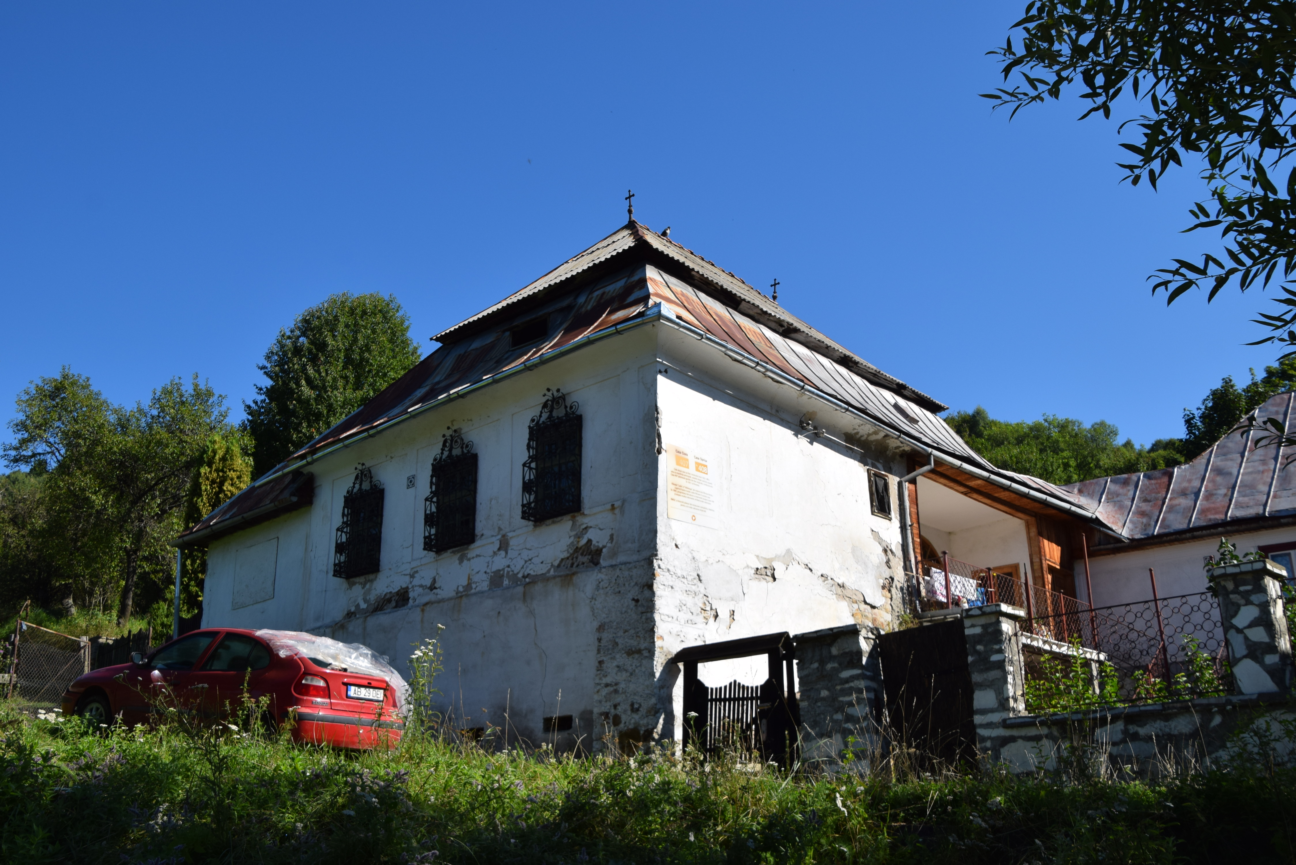 Casă, nr. 408 din Roșia Montană